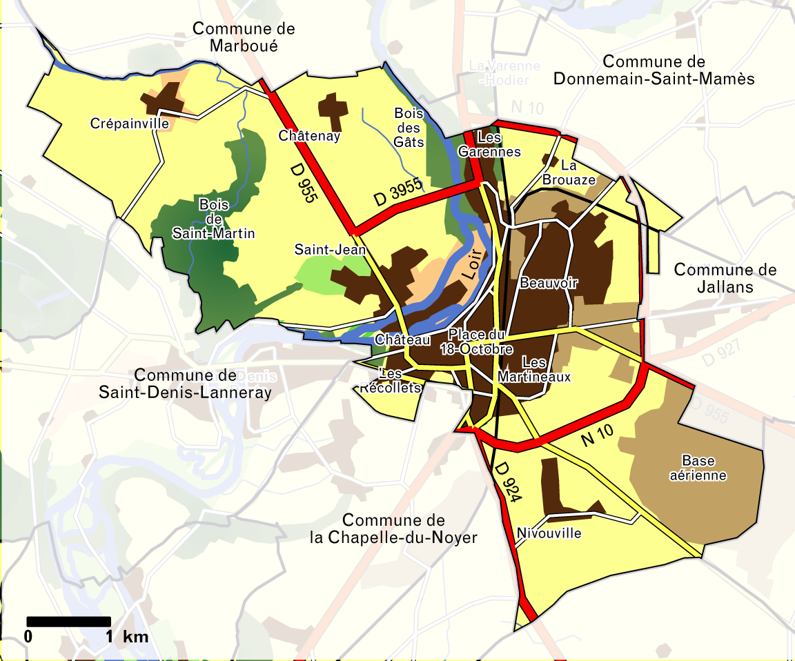 Plan de la commune de Châteaudun dans ses limites administratives, avec: - l'occupation du sol (zones urbanisées en marron foncé, zones d'activités en marron clair, zones de culture en jaune, zones prairiales ou assimilés en vert clair, bois en vert foncé), source Agence européenne de l'Environnement (base Corine Land Cover) - les rivières, voies ferrées et routes, source IGN